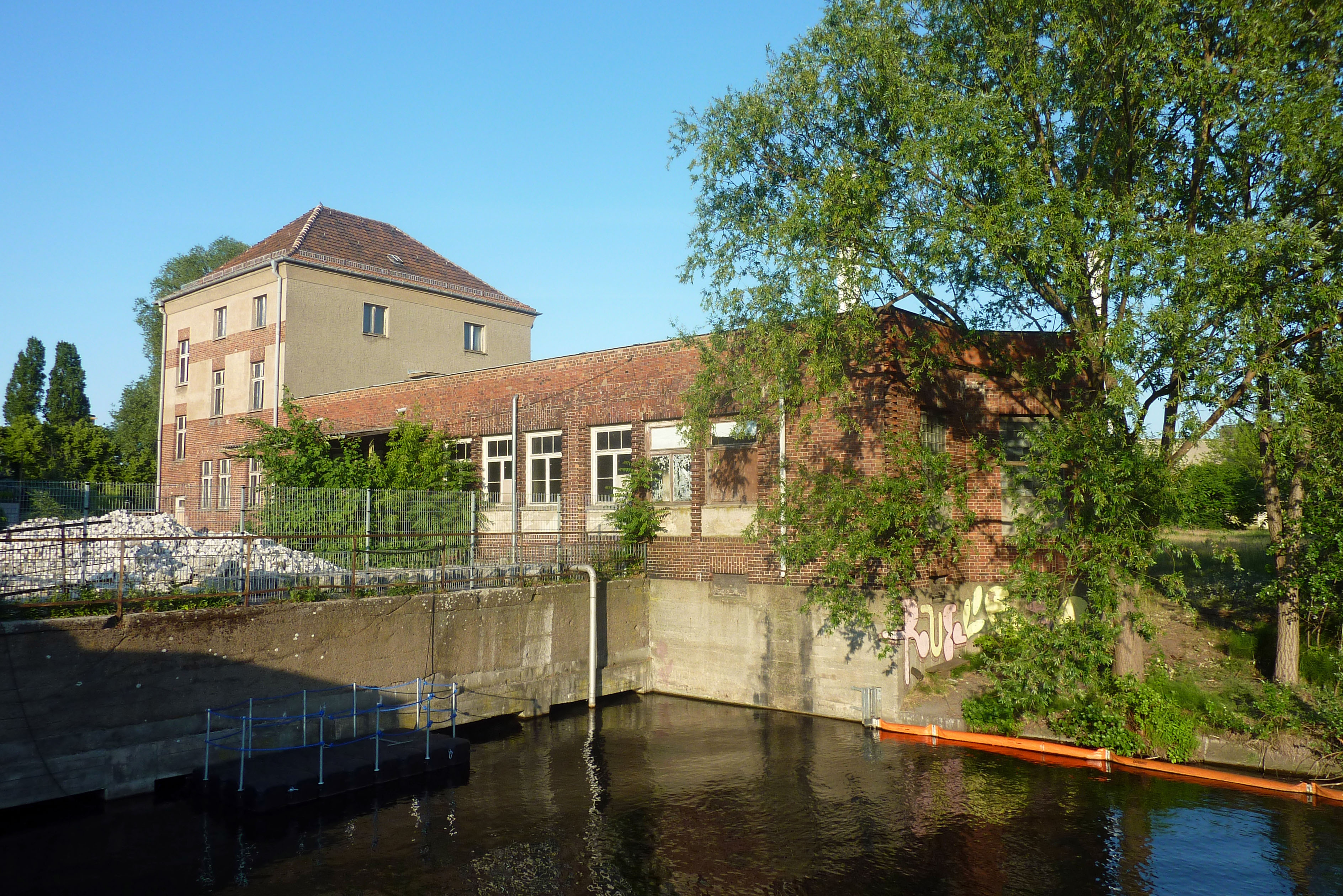 Ehemaliges Verwaltungs- und Restaurationsgebäude des damaligen Städtischen Flußbades Lichtenberg, neben dem Kühlwasserauslaufkanal des Heizkraftwerkes Klingenberg, an der Straße Zur Alten Flussbadeanstalt in Berlin-Rummelsburg.